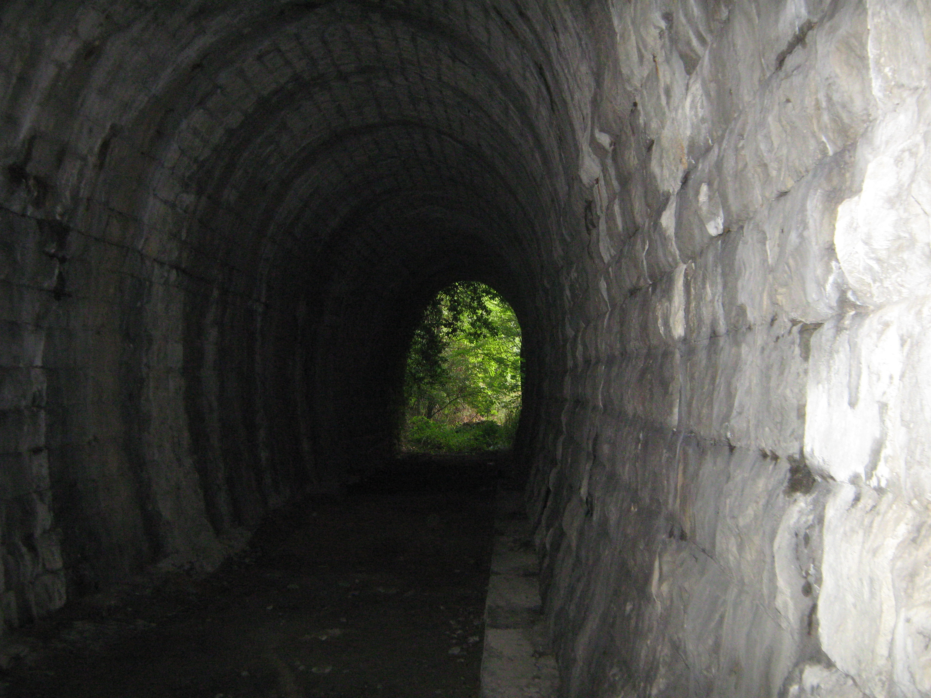 galleria sulla linea ferroviaria incompiuta Maranello-Pavullo 1919 - galleria di Pavullo